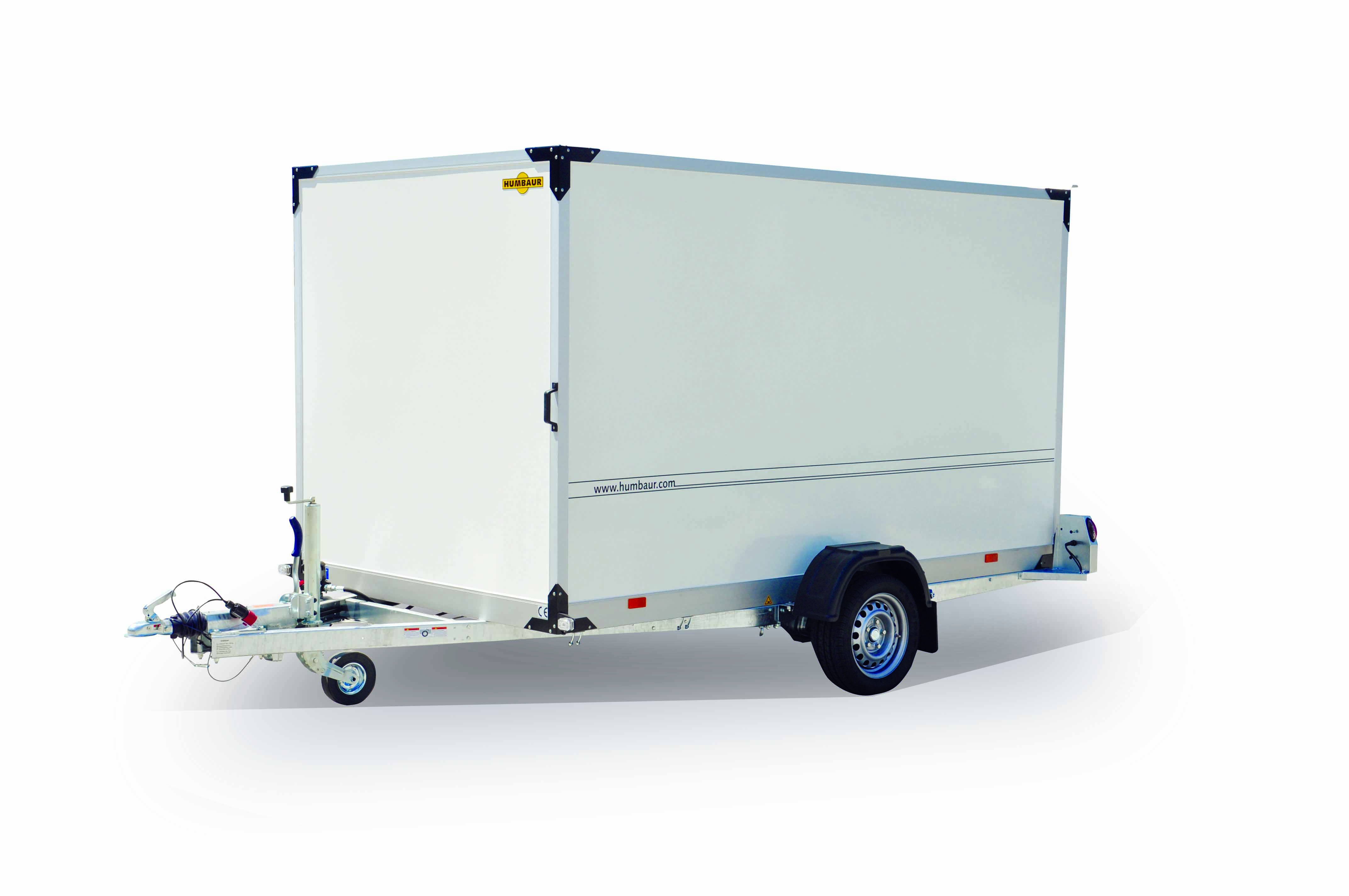 Humbaur Serie5000 Plywood HKT